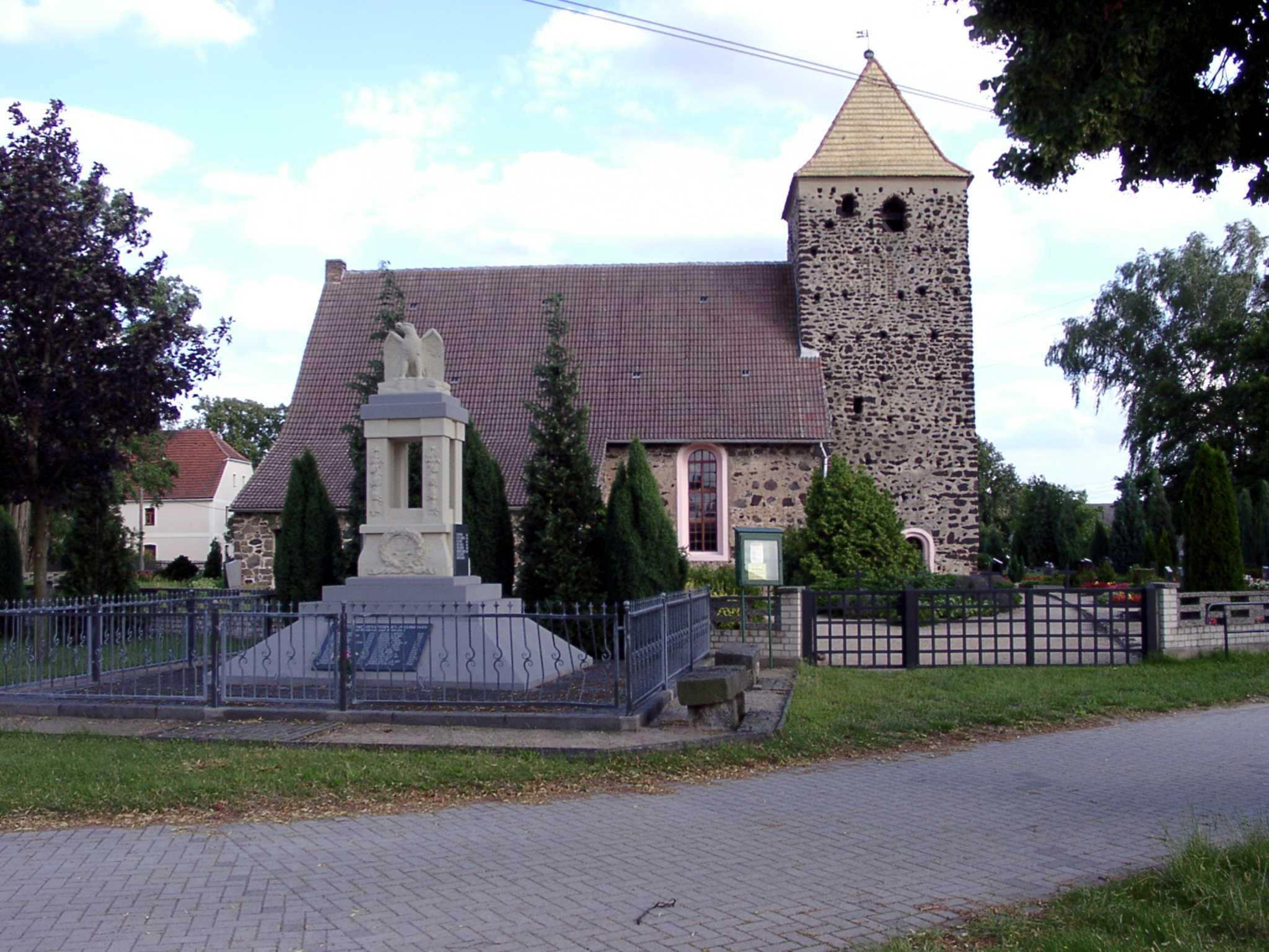 Wiederau